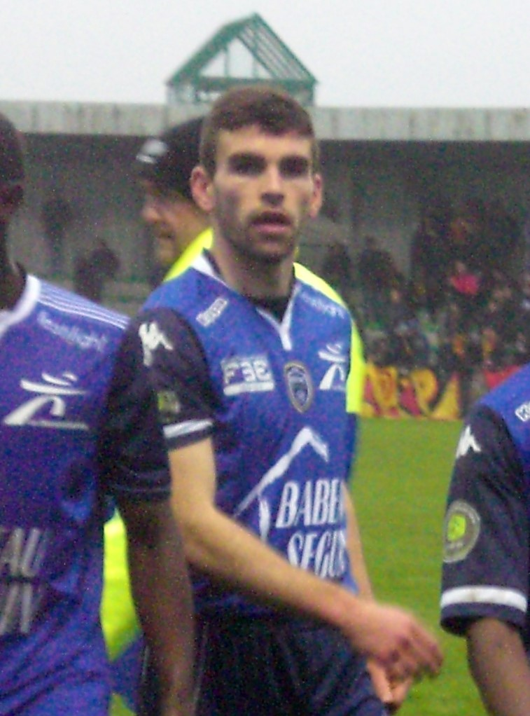 Thomas Dasquet lors du match RC Lens B / ES Troyes B, comptant pour la dix-huitième journée du Championnat de France de football amateur (CFA), le13 février 2016, au Stade François Blin d'Avion.